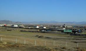 Toàn cảnh Zunnkharaa, tỉnh Selenge, Mông Cổ.